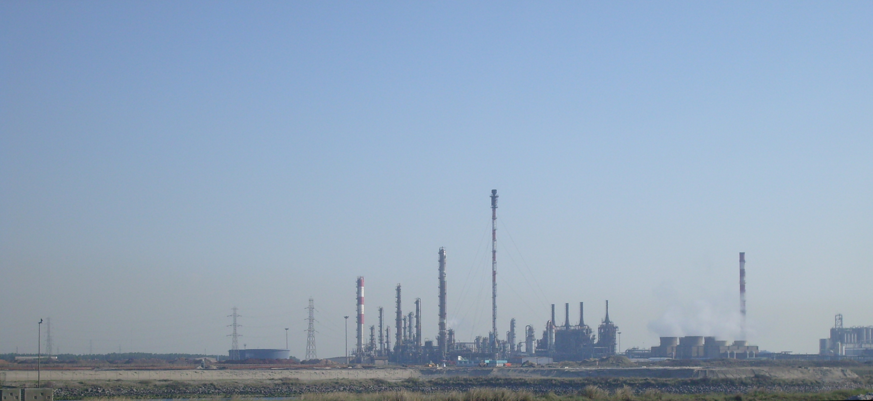 Polimeri Europa France Mardyck Licensing Source Source:Travail personnel (own work)